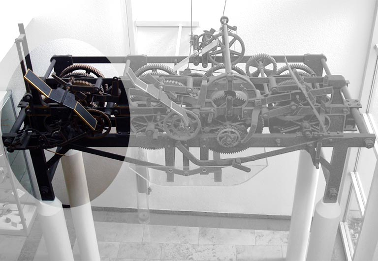 Ehemalige Turmuhr der kath. Pfarrkirche St. Kilian in Schweinfurt. Das Werk wurde 1929 von der Firma Georg Rammensee in Gräfenberg/Ofr. konstruiert. Im Jahre 1980 wurde es durch eine vollelektronische Turmuhrenanlage Hörz DCI ersetzt. Das mechanische Uhrwerk wurde von Turmuhren-Enthusiasten vor der Verschrottung bewahrt, restauriert und 1989 im Foyer des Schweinfurter Kolpingshauses aufgestellt.